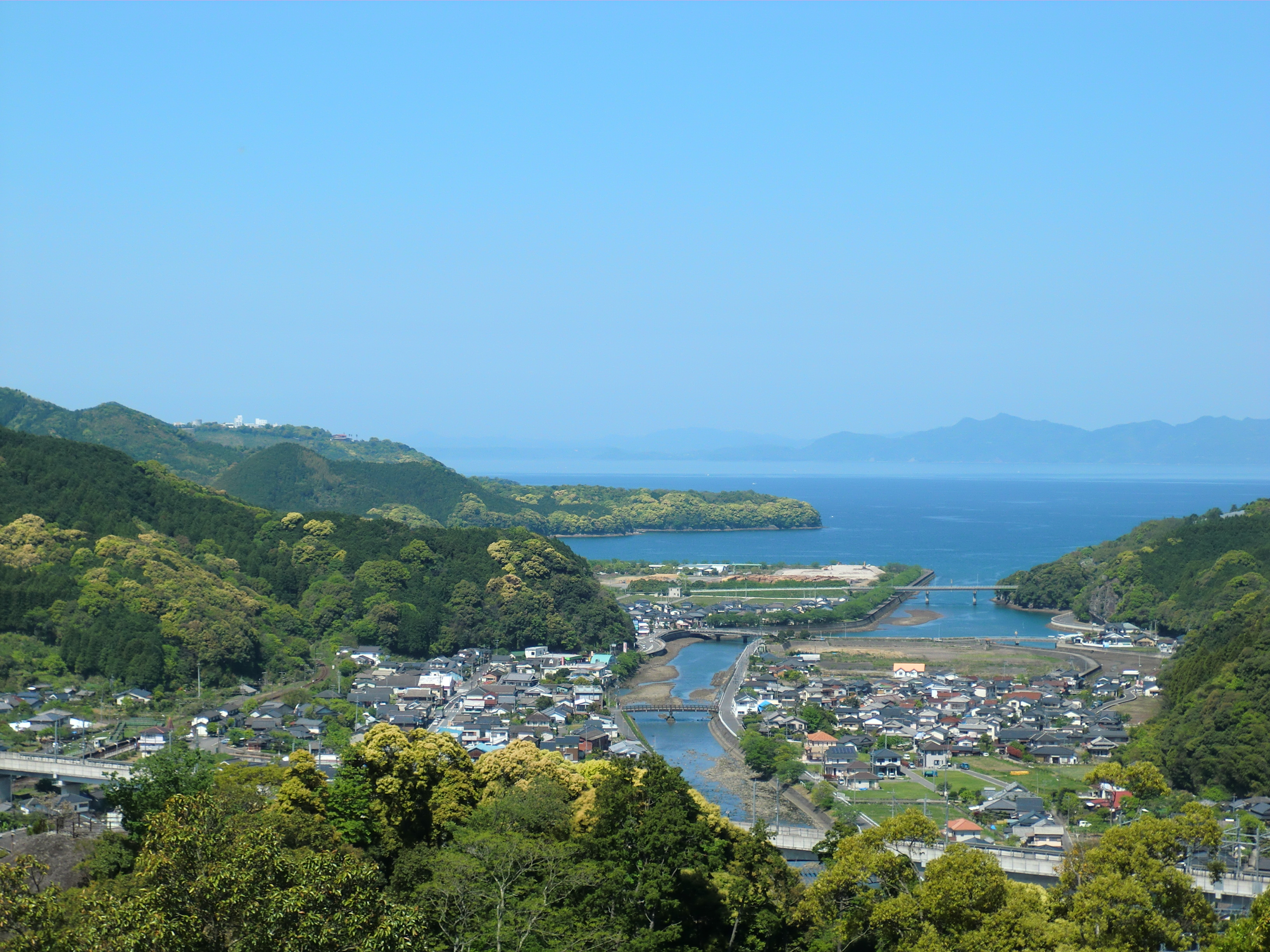 熊本県津奈木町にある舞鶴城（まいづるじょう）公園から見た津奈木町の中心部